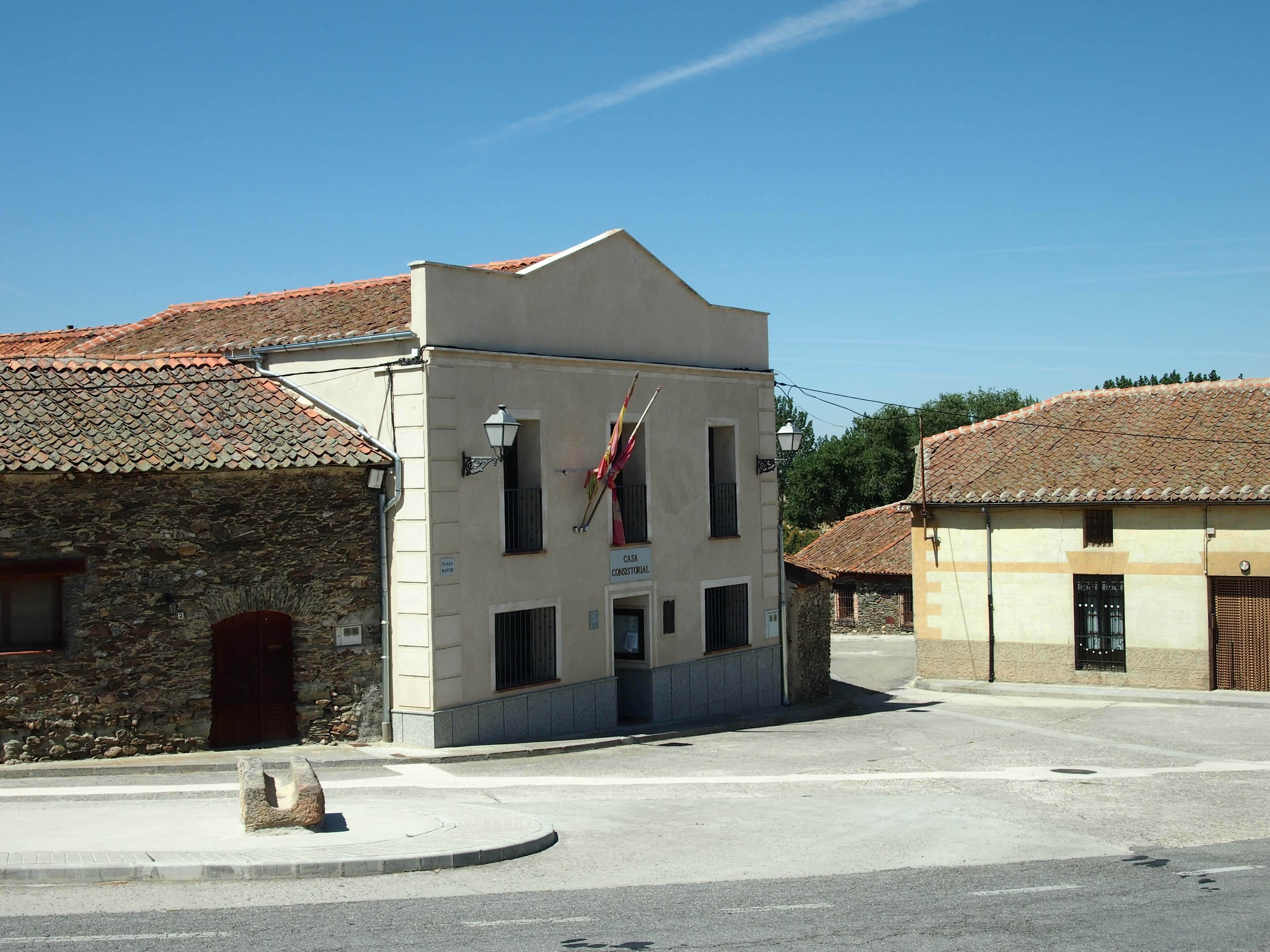 Vista de la Casa Consistorial y la Plaza Mayor de Ortigosa de Pestaño, Segovia (España).